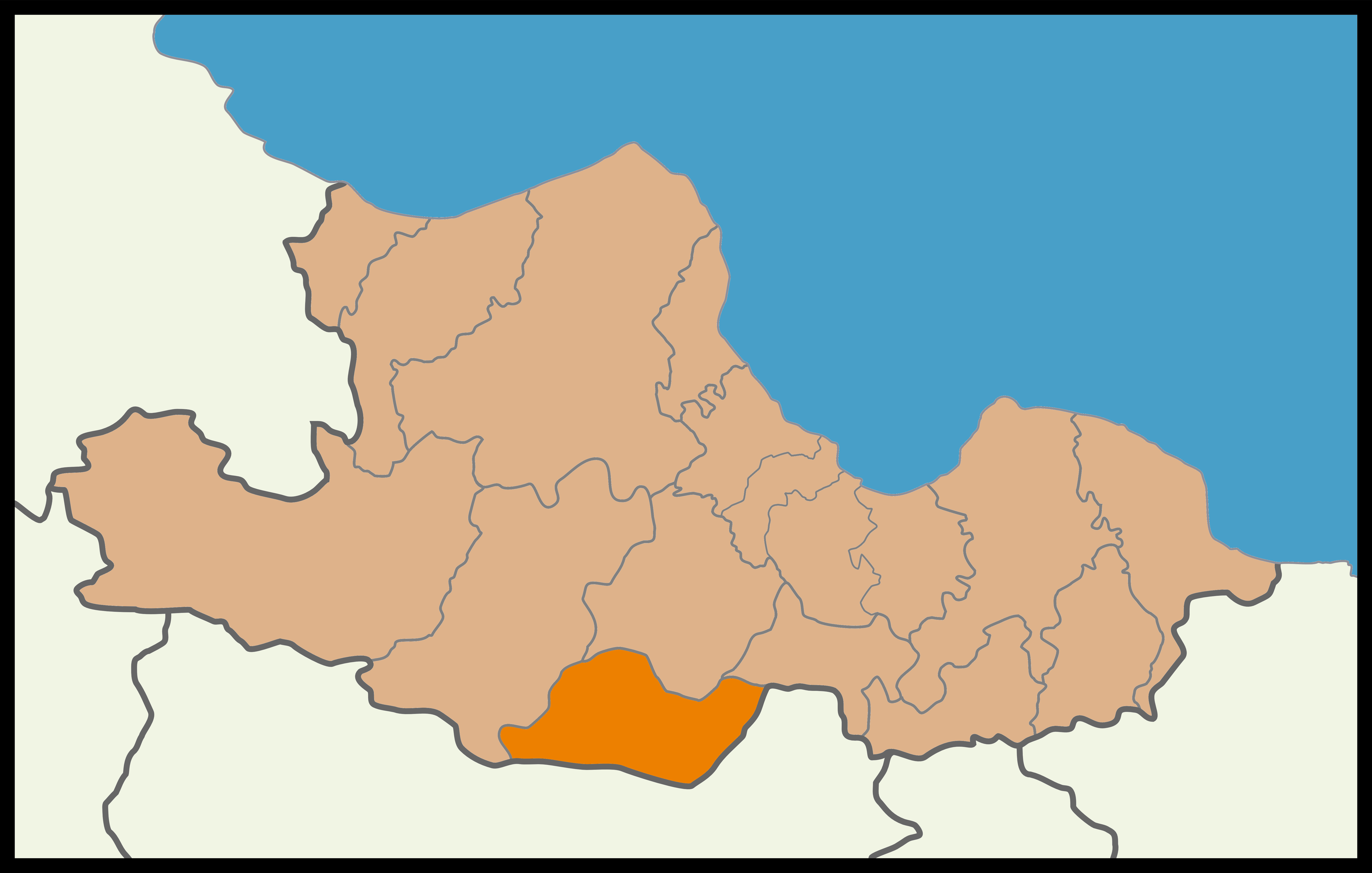 Samsun'un Ladik ilçesinin 2014 Türkiye yerel seçimleri haritası.